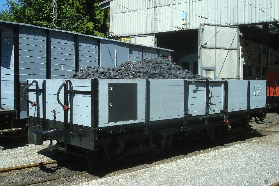 Offener Güterwagen LO 153 der Montreux–Berner Oberland-Bahn (MOB), bei der Museumsbahn Blonay-Chamby (BC) in Chamby-Musée (Chaulin).